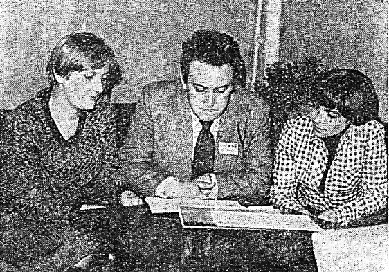 SYMLEK - projektanci systemu. od lewej: mgr Zofia Stramska, dyrektor ZETO Olsztyn mgr Bogusław Gruźlak, mgr Regina Ilukowicz